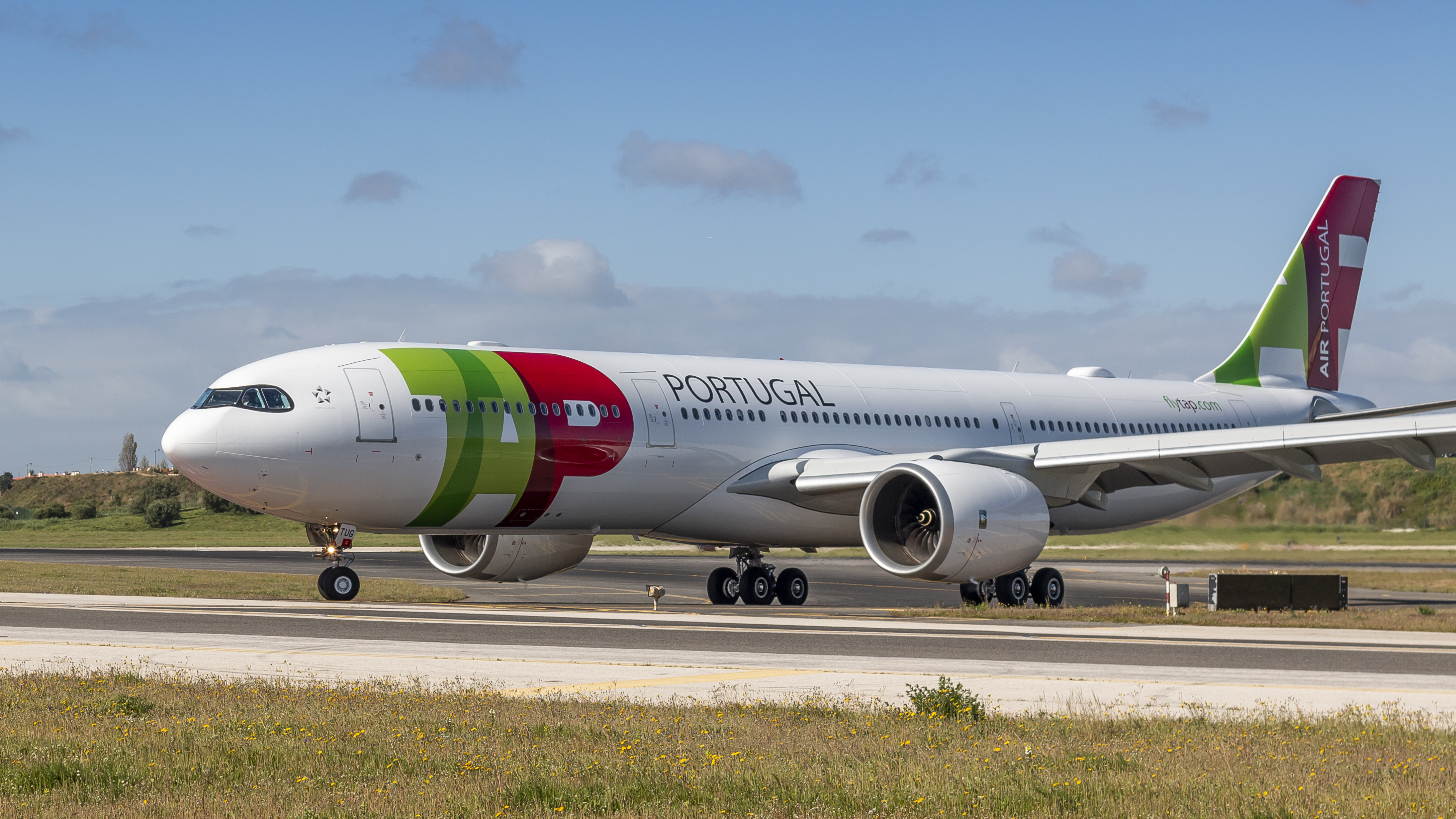 Lisbon, Portugal